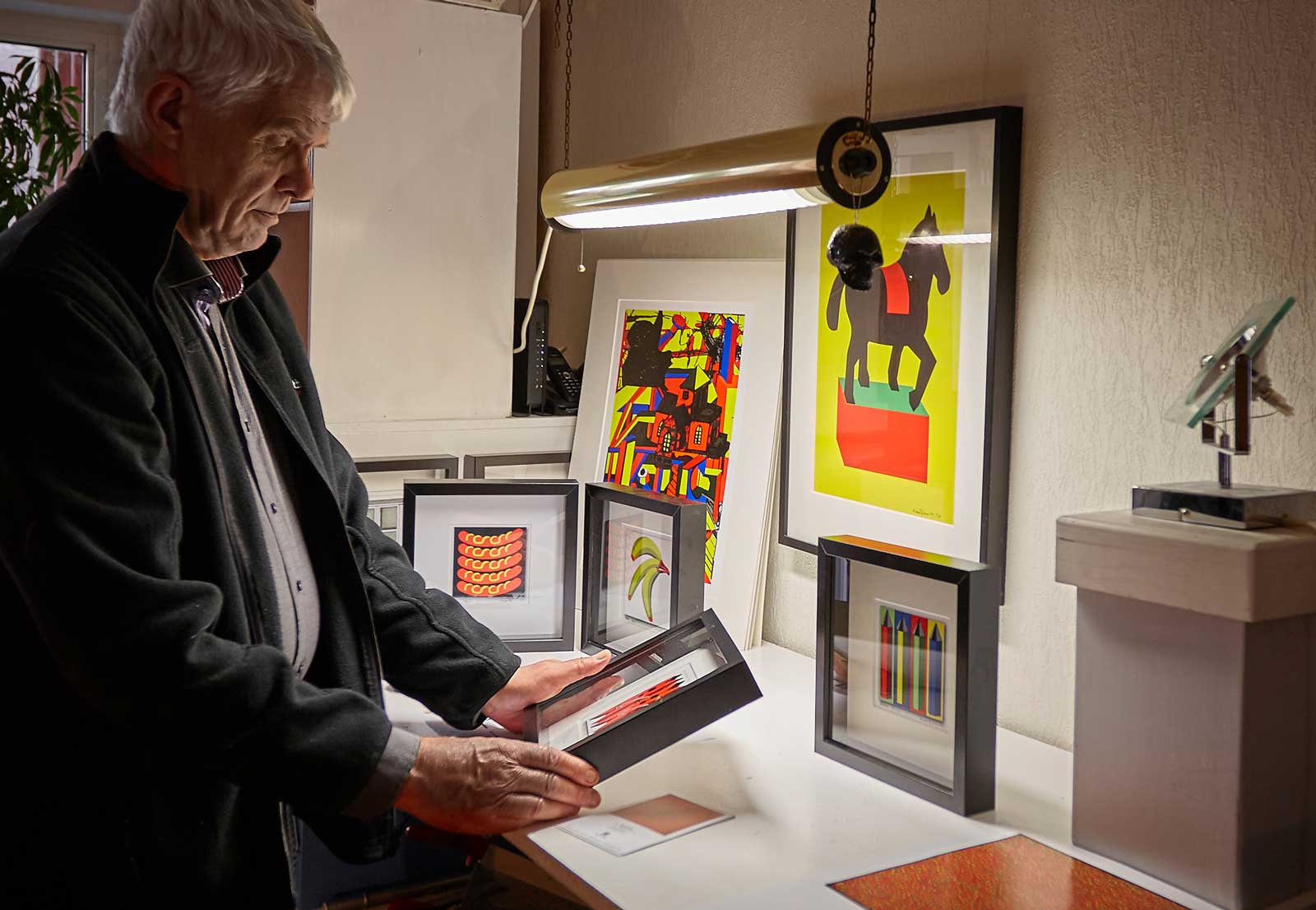 Hans i sin ateljé I Malmö.